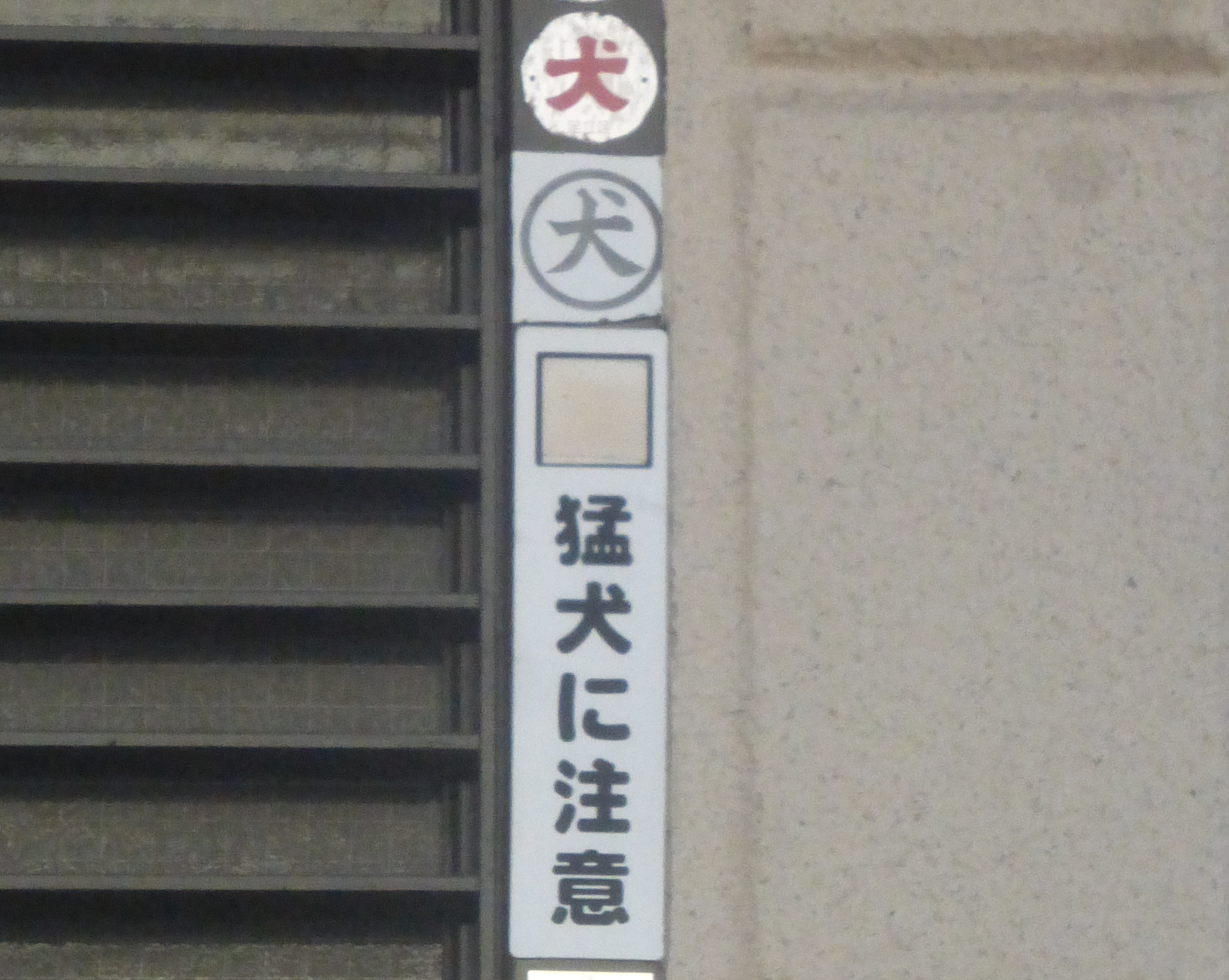 猛犬に注意と書いてある張り出し (Japanese "beware of dog" sign)